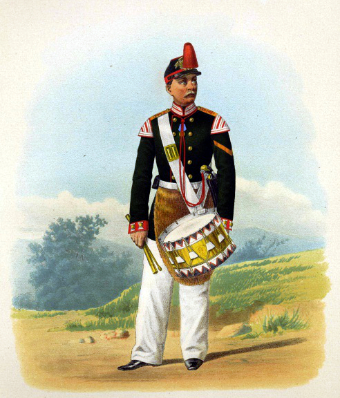 Барабанщик 1-го лейб-гренадерского Екатеринославского Его Величества полка (В парадной форме) 20 мая 1865 года